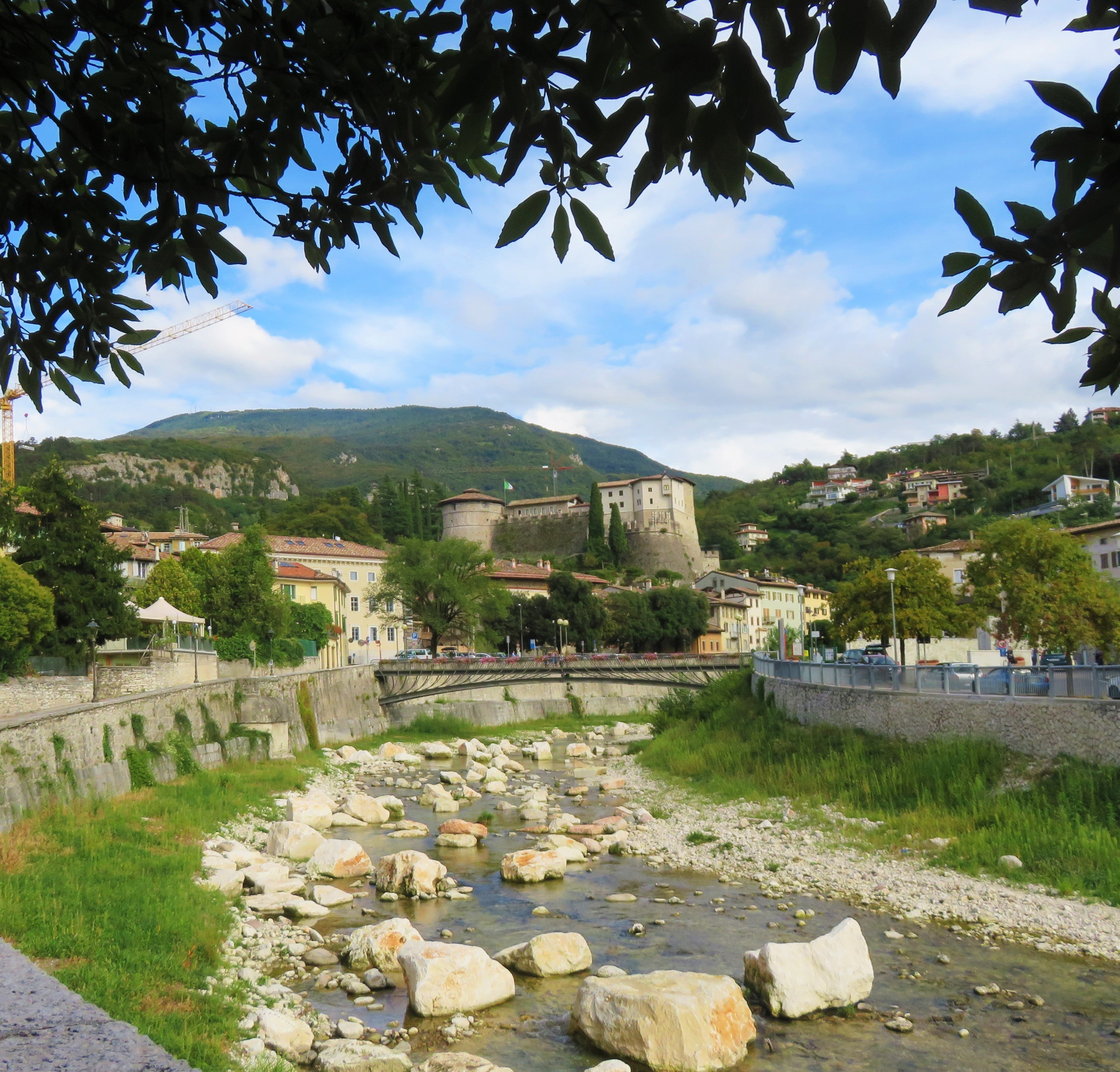 Castello di Rovereto visto dal torrente Leno